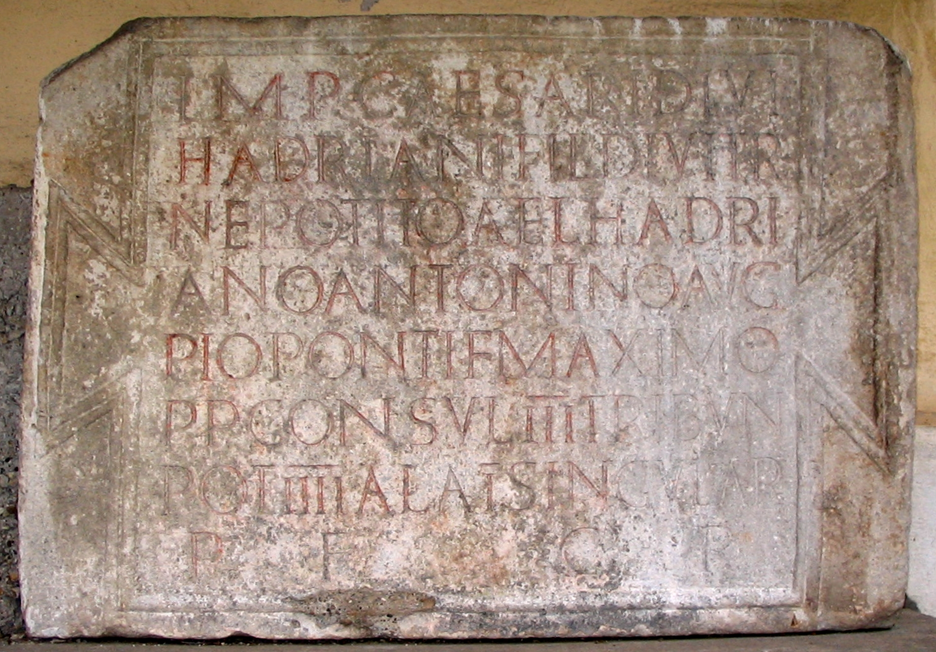 Sebastiankapelle, Pförring, Landkreis Eichstätt, Oberbayern: Bauinschrift des Kastell Pförring aus dem Jahre 141 n.Chr.